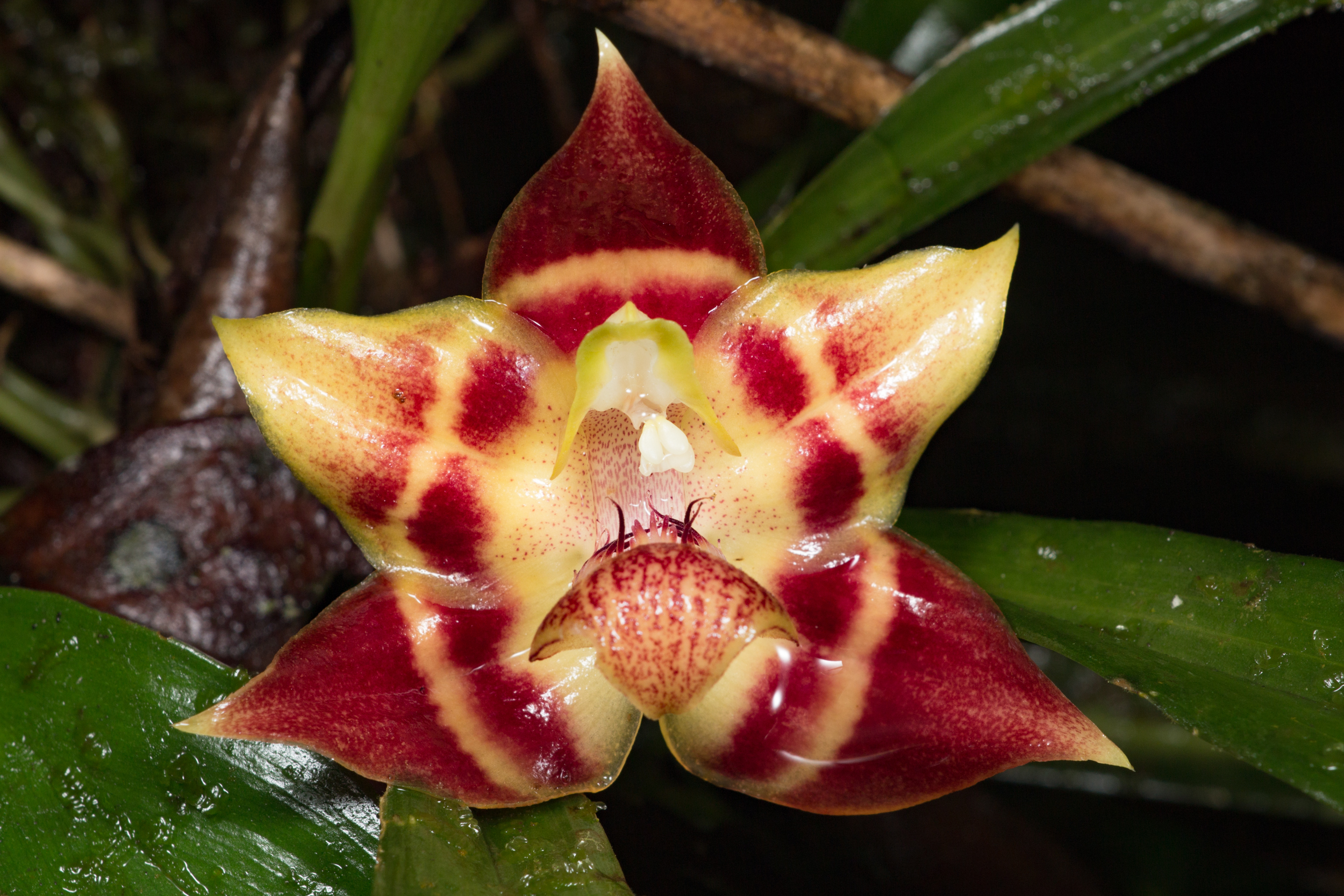 Huntleya lucida